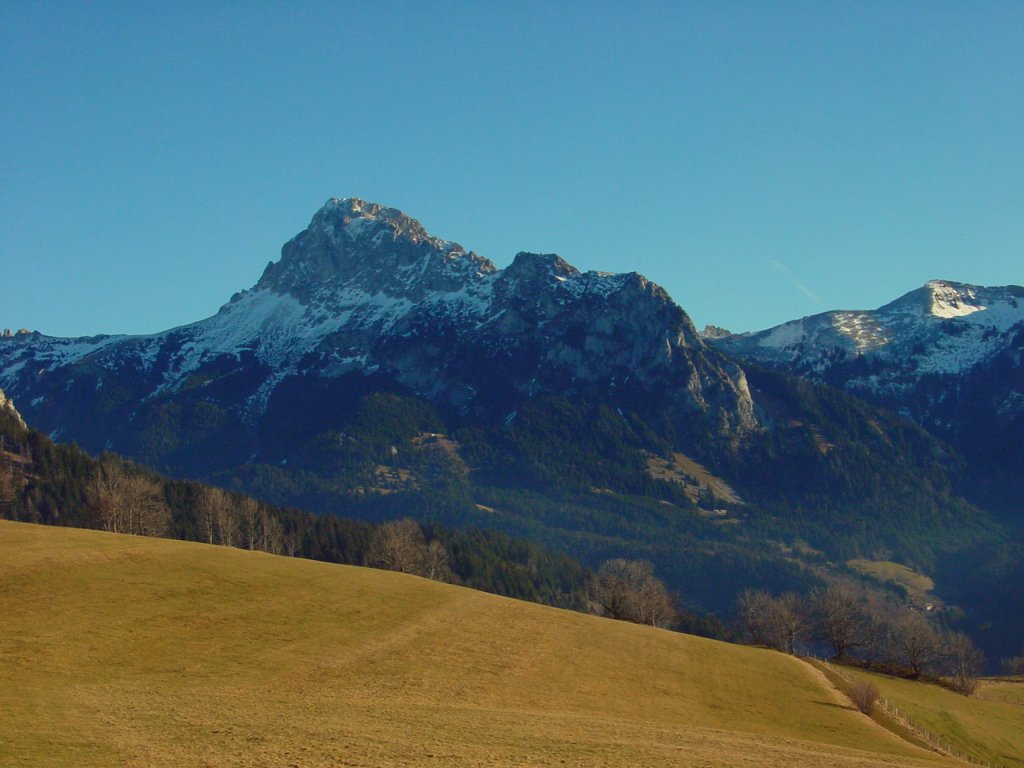 La Dent d'Oche (2222 m.) vue depuis les alpages du Mont Bénand (Haute-Savoie)